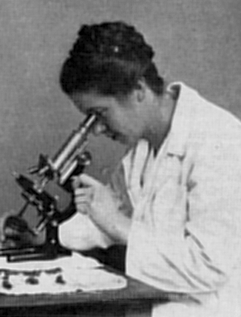 Ida Boysen am Mikroskop.